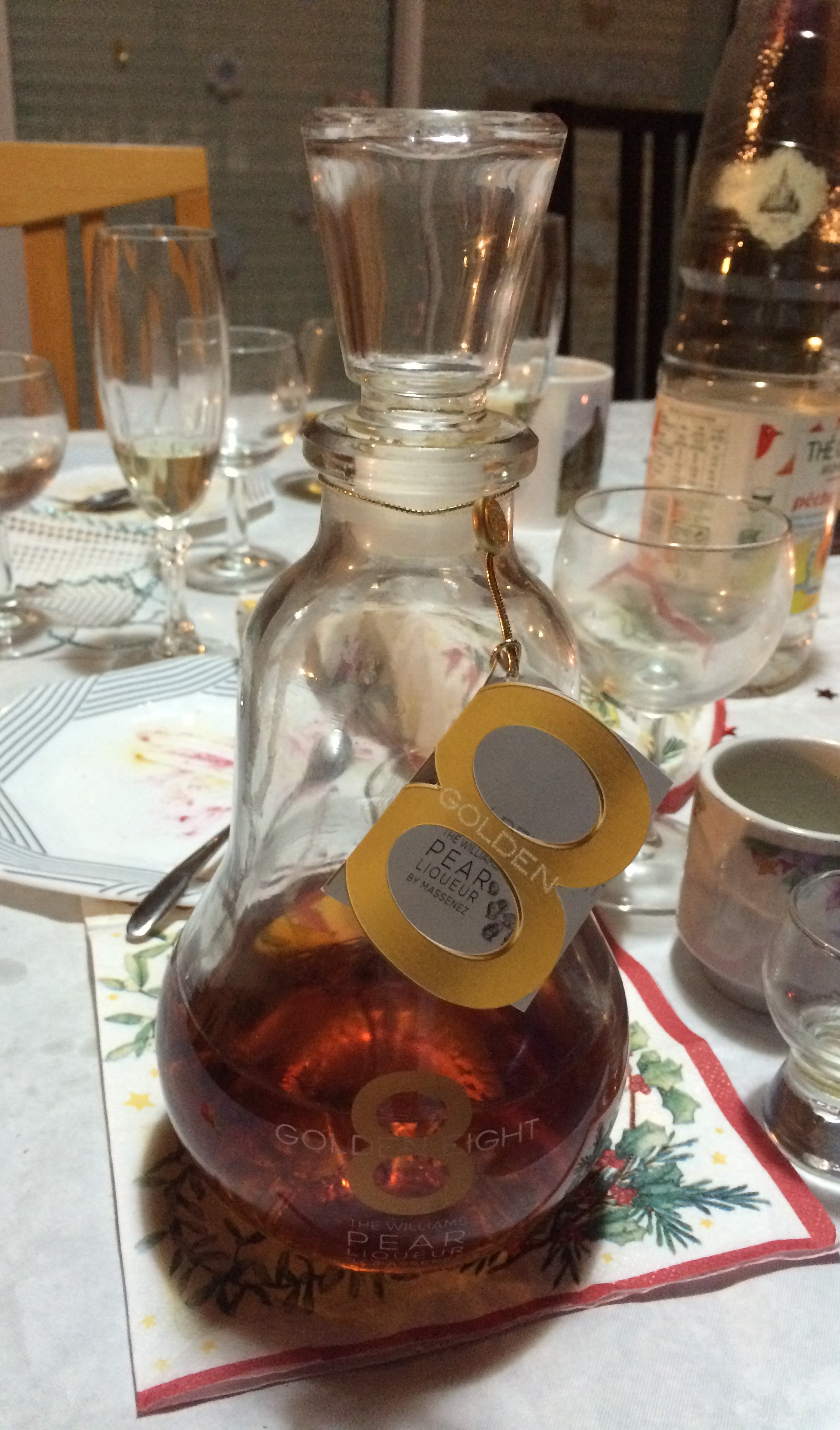 Spécialité de liqueur de poire "Golden 8" de la distillerie Massenez dans une bouteille en verre en forme de poire.